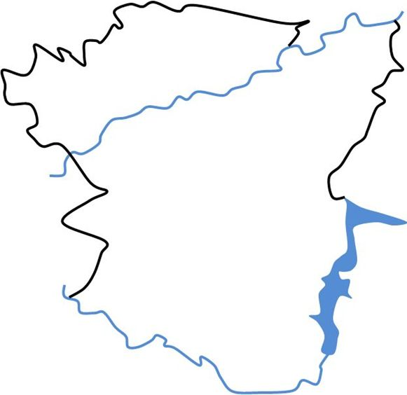 Vitré avant toute occupation humaine